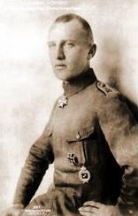 Fotografie des Jagdfliegers W. P. Schreiber